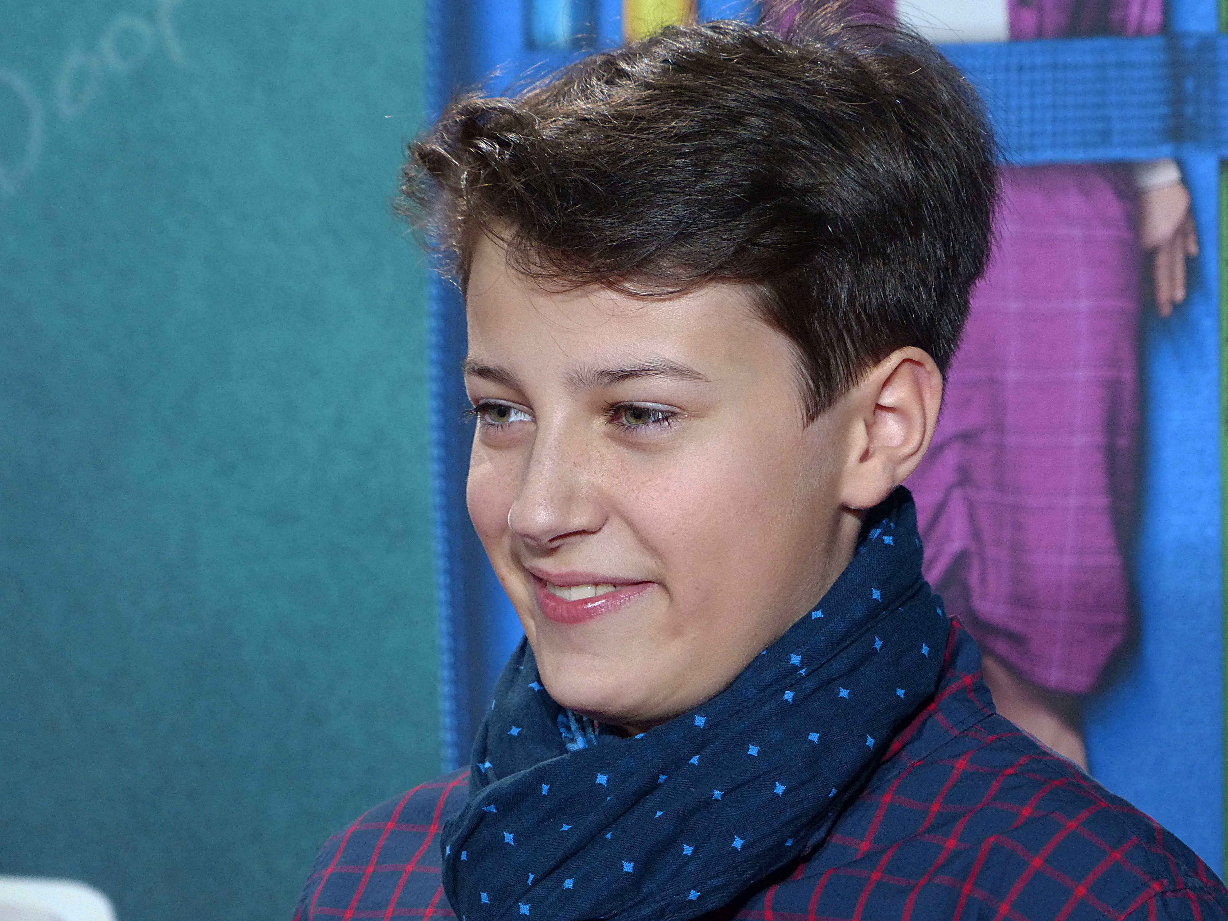 Oskar Keymer bei der Premiere von "Hilfe, ich habe meine Lehrerin geschrumpft", im Dezember 2015.